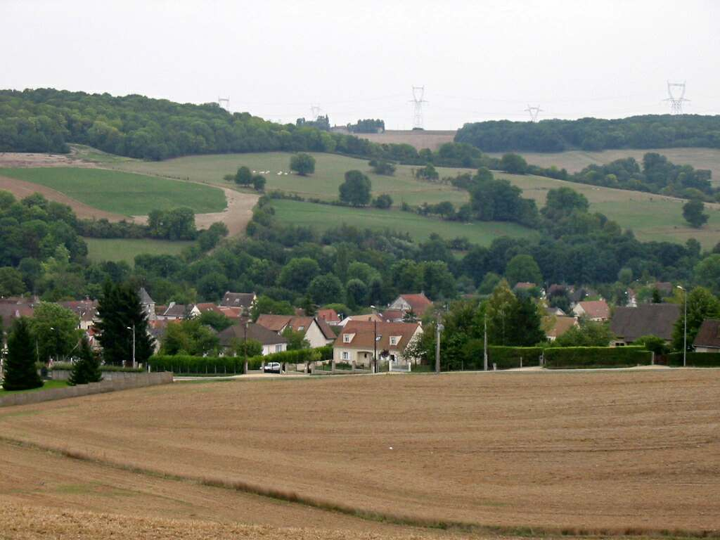 Vert (Yvelines) vue générale Photo JH Mora, août 2005